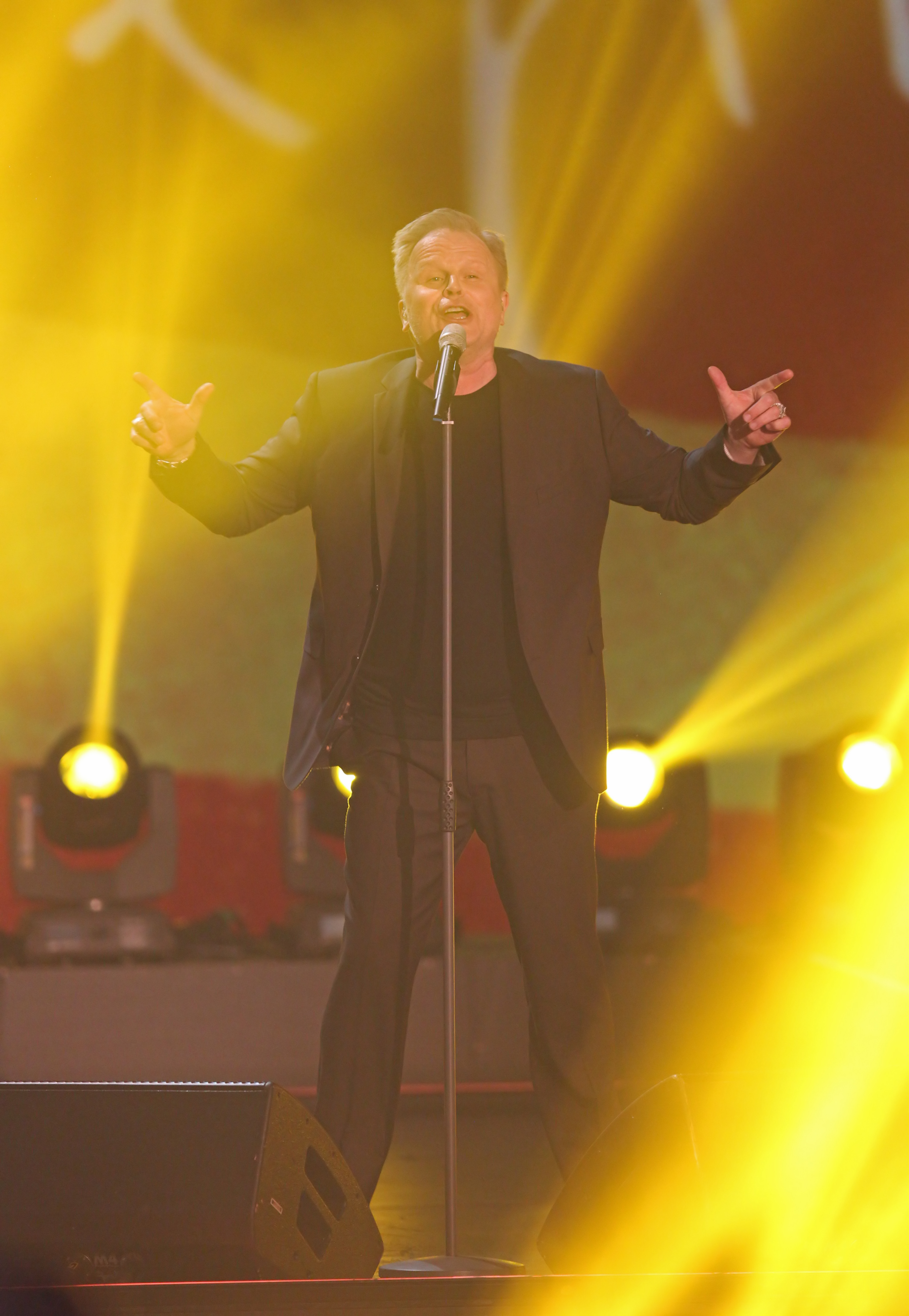 Wetten, dass.. ? 214. show in Graz, 8. Nov. 2014 Herbert Grönemeyer at 214. Wetten, dass.. ? show in Graz, 8. Nov. 2014